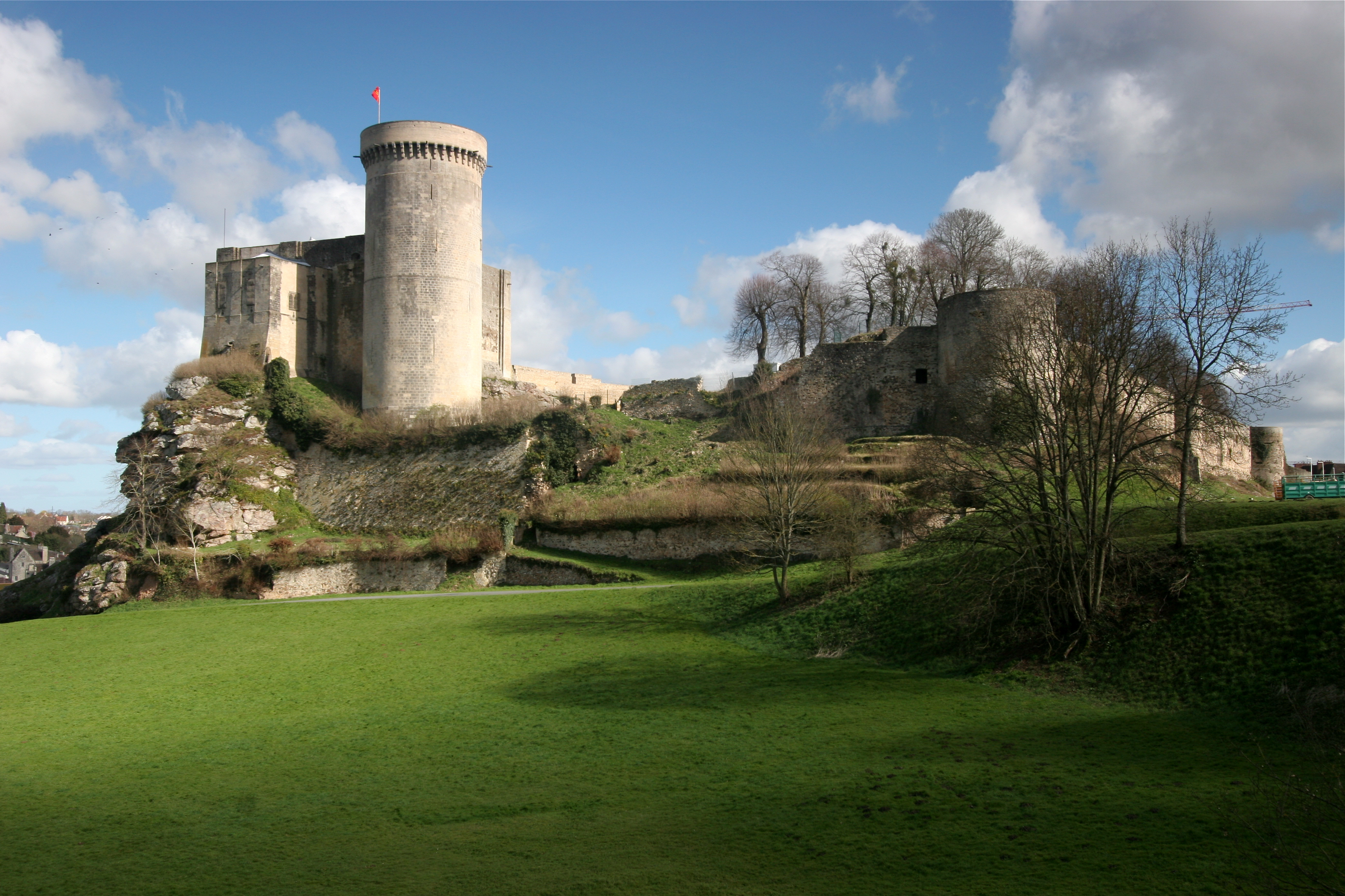 Chateau de Falaise, Calvados, France